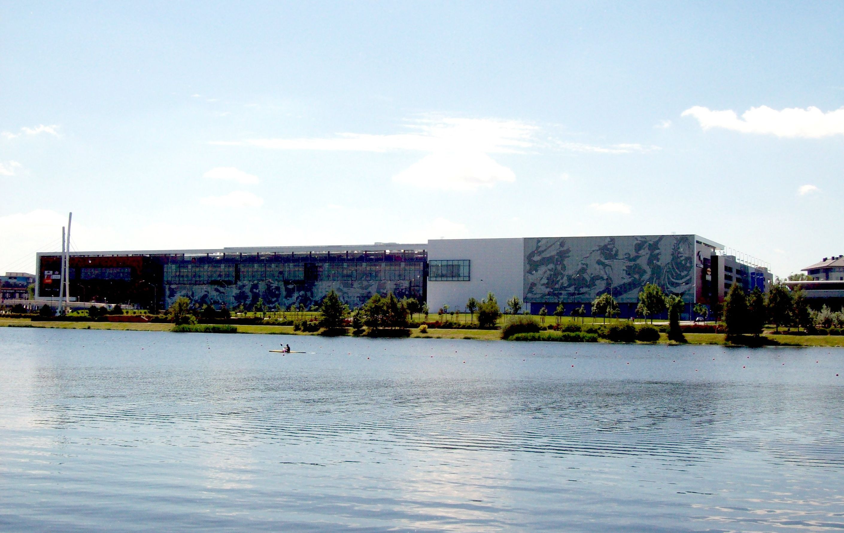 Centro Comercial Malta en Poznan, Polonia.